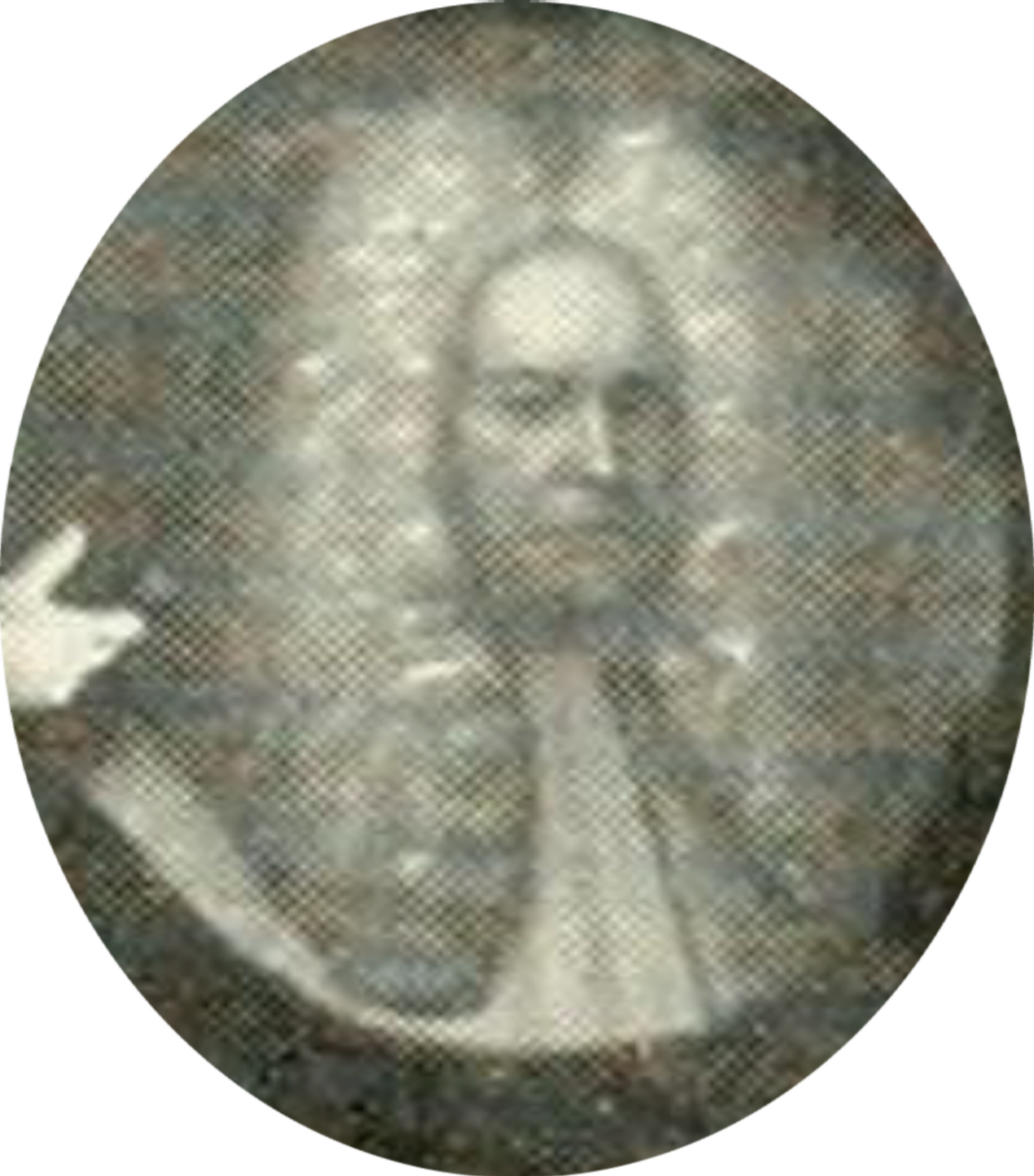 Jakob Hübens (* 6. Mai 1654; † 9. April 1731 ebenda), Bürgermeister der Hansestadt Lübeck. Ausschnitt seines Epitaphs in der Lübecker Marienkirche, 1942 verbrannt.